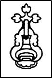 El glifo del municipio de Amecameca de Juárez